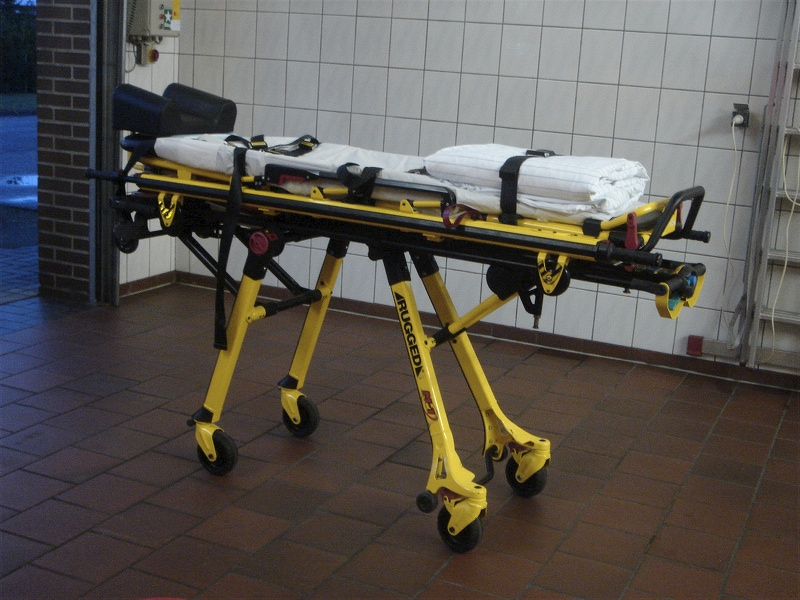 Stryker Roll-In-Trage